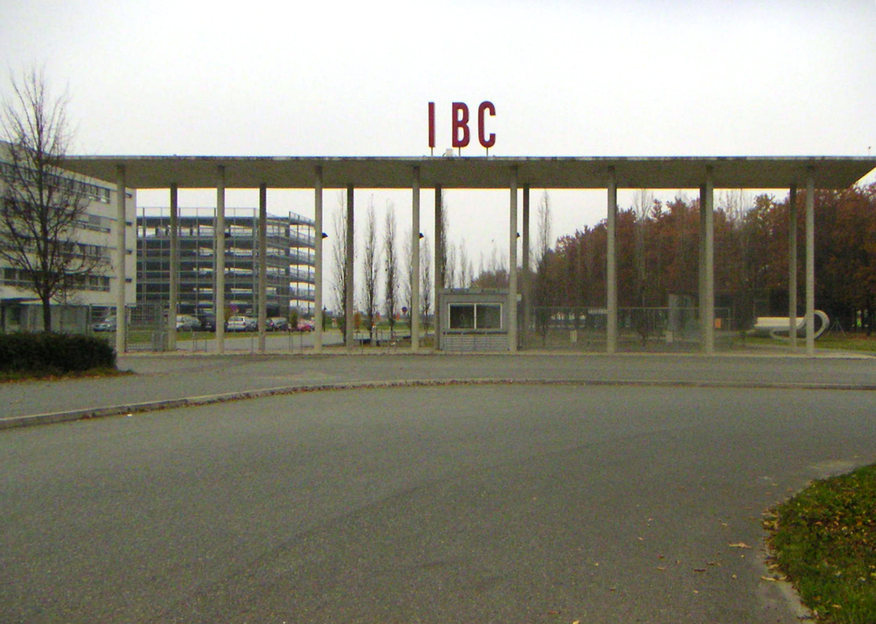 Unterpremstätten bei Graz, Flugdach für ehemalige Entrees zur IGS – Internationalen Gartenschau 2000 (Oktober 2005)